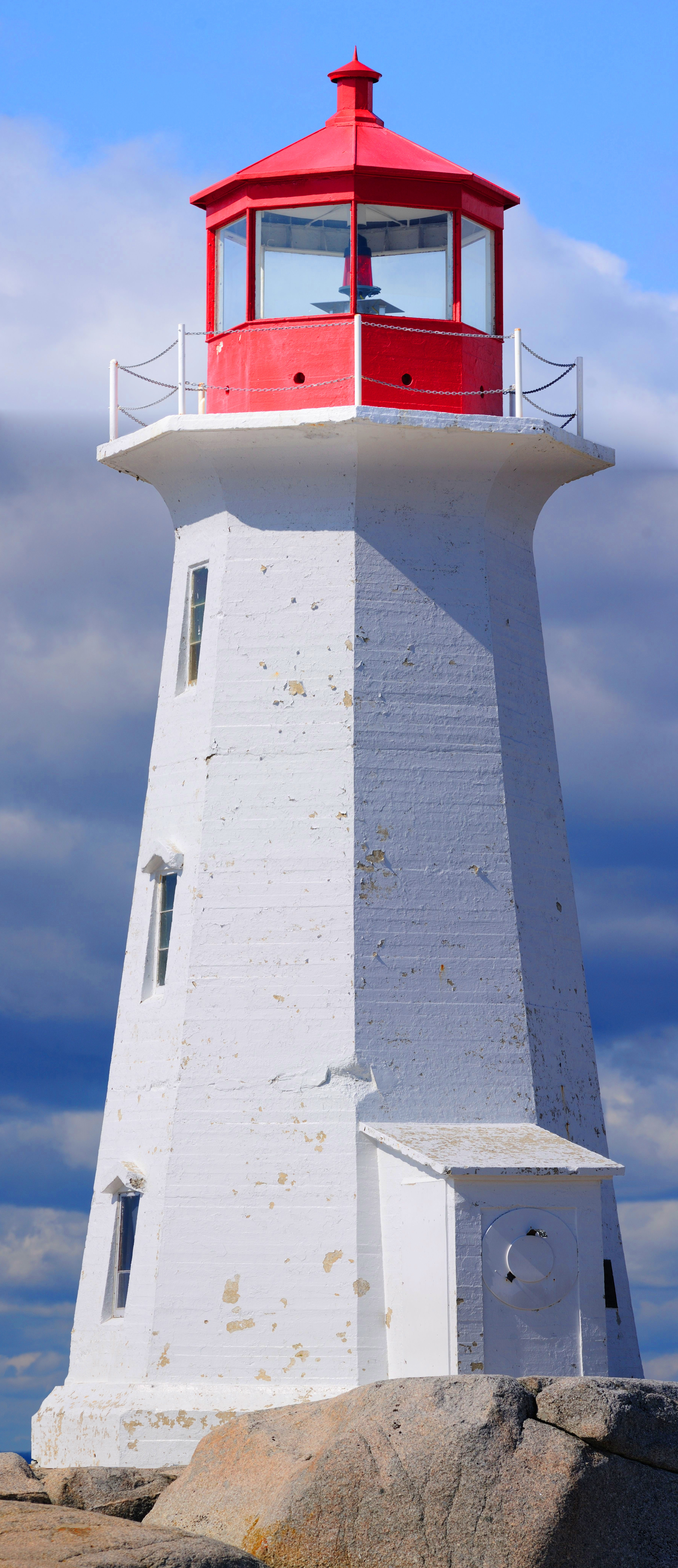 Peggys Point Leuchtturm